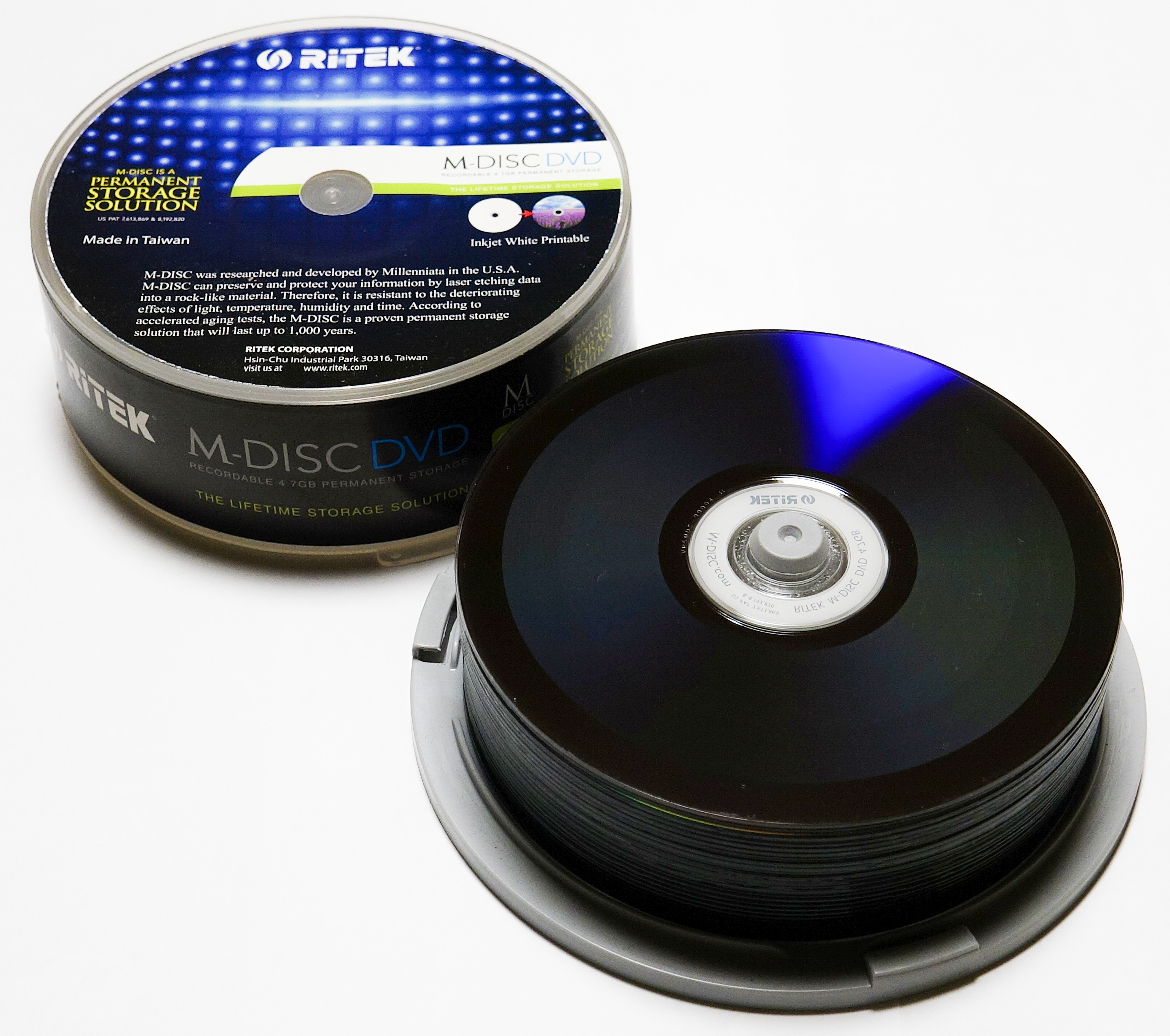 M-DISC (DVD 4.7GB RiTEK)